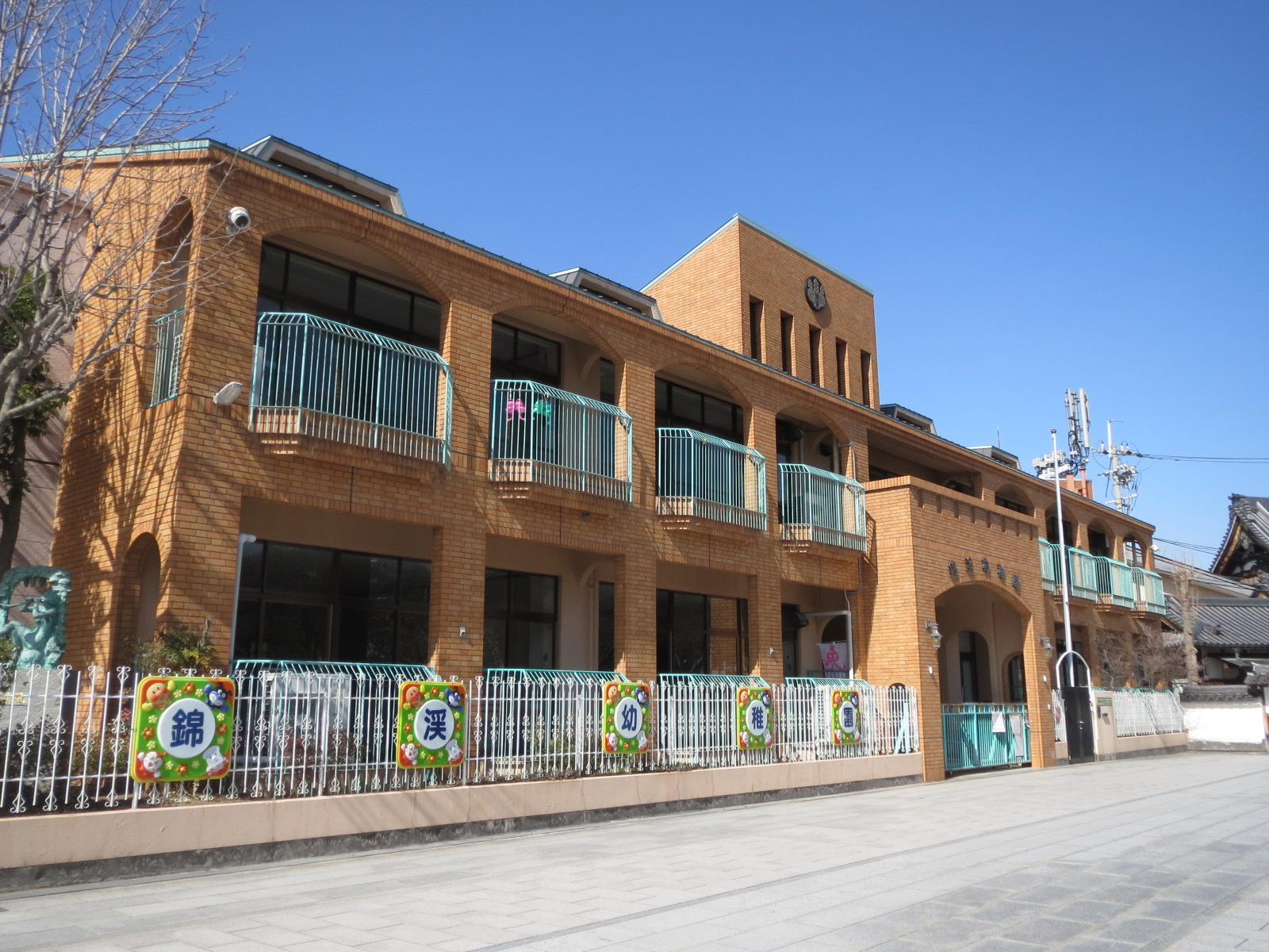 極楽寺が運営